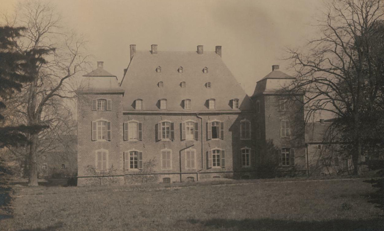 Westfassade des im Zweiten Weltkrieg zerstörten Herrenhauses von Schloss Breill in Geilenkirchen